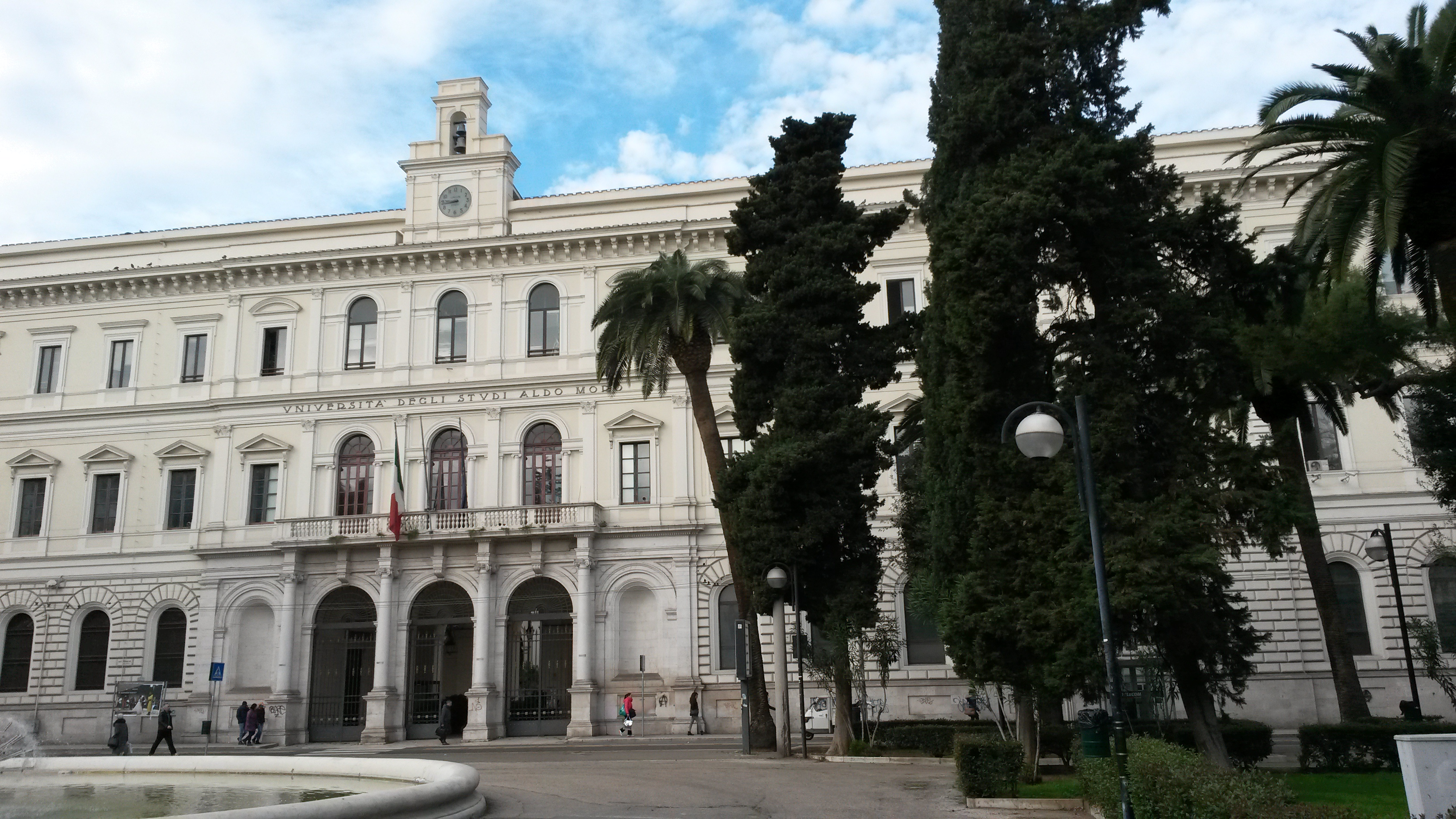 Università di Bari